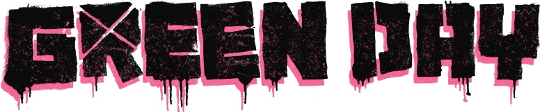 Nuovo logo dei Green Day